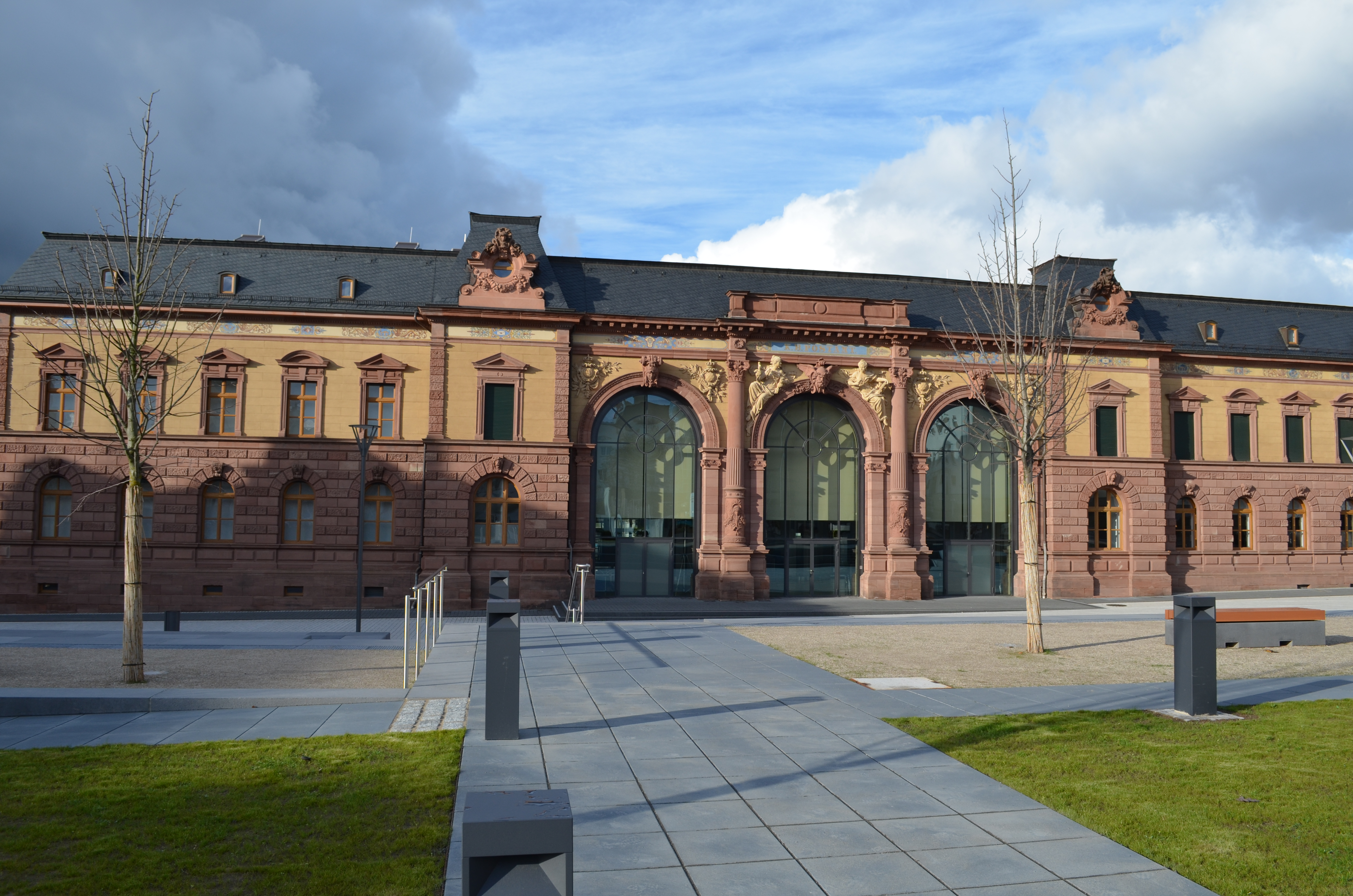 Poststraße 2 in Pirmasens: Ehemaliges Königlich-bayerisches Postamt; repräsentativer Neurenaissancebau, 1893; 2013 nach Umbau Nutzung als Forum Alte Post